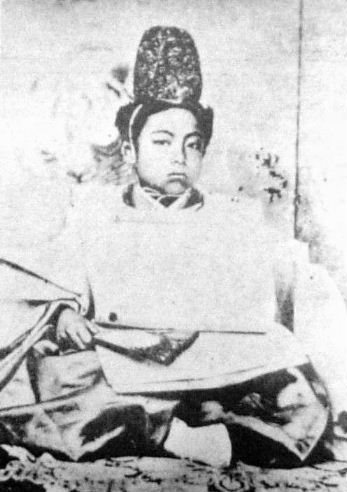 a Japanese man 徳川慶喜 (Yoshinobu Tokugawa)